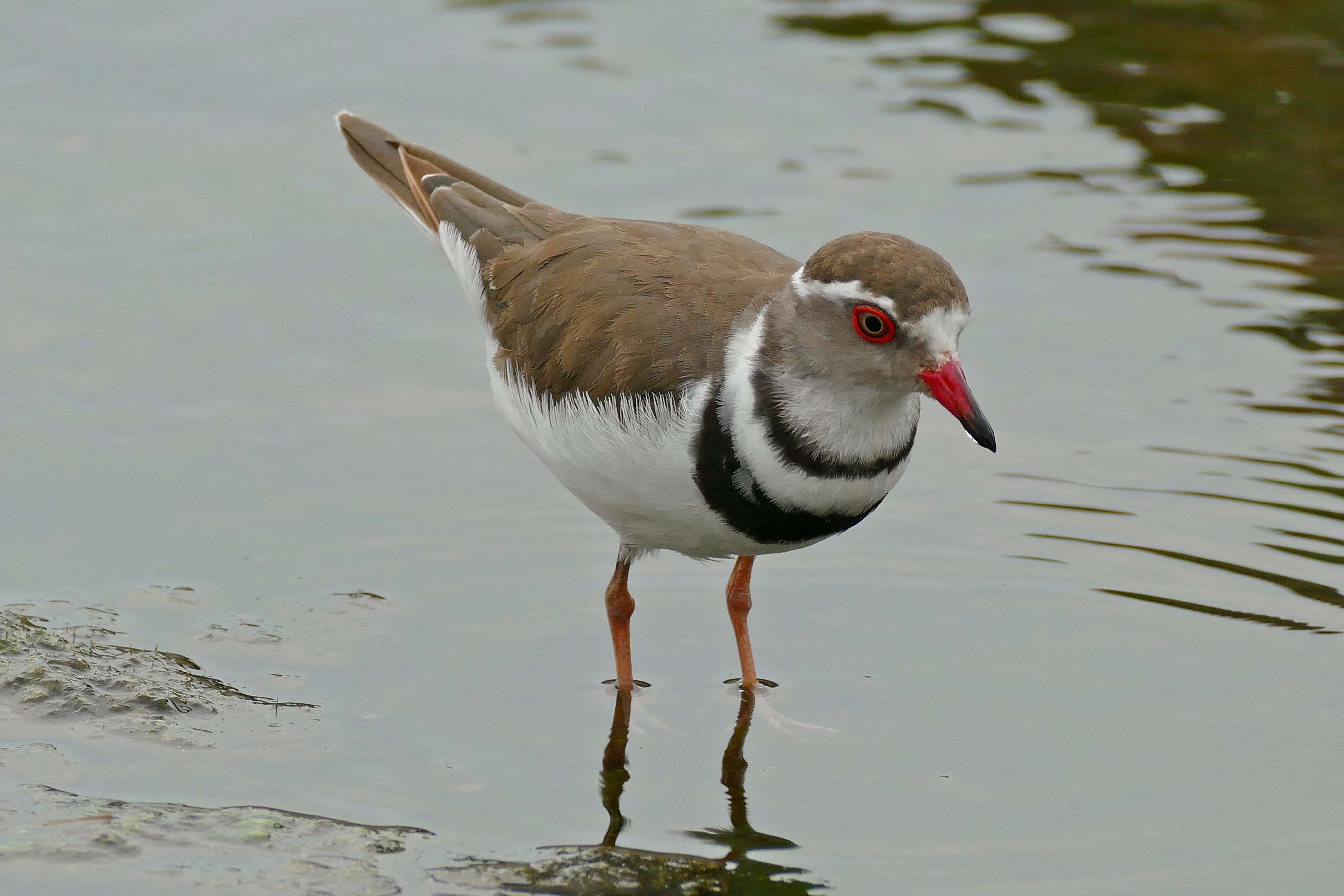 Biyamiti Weir, S114 Road West of Biyamiti, Kruger NP, SOUTH AFRICA